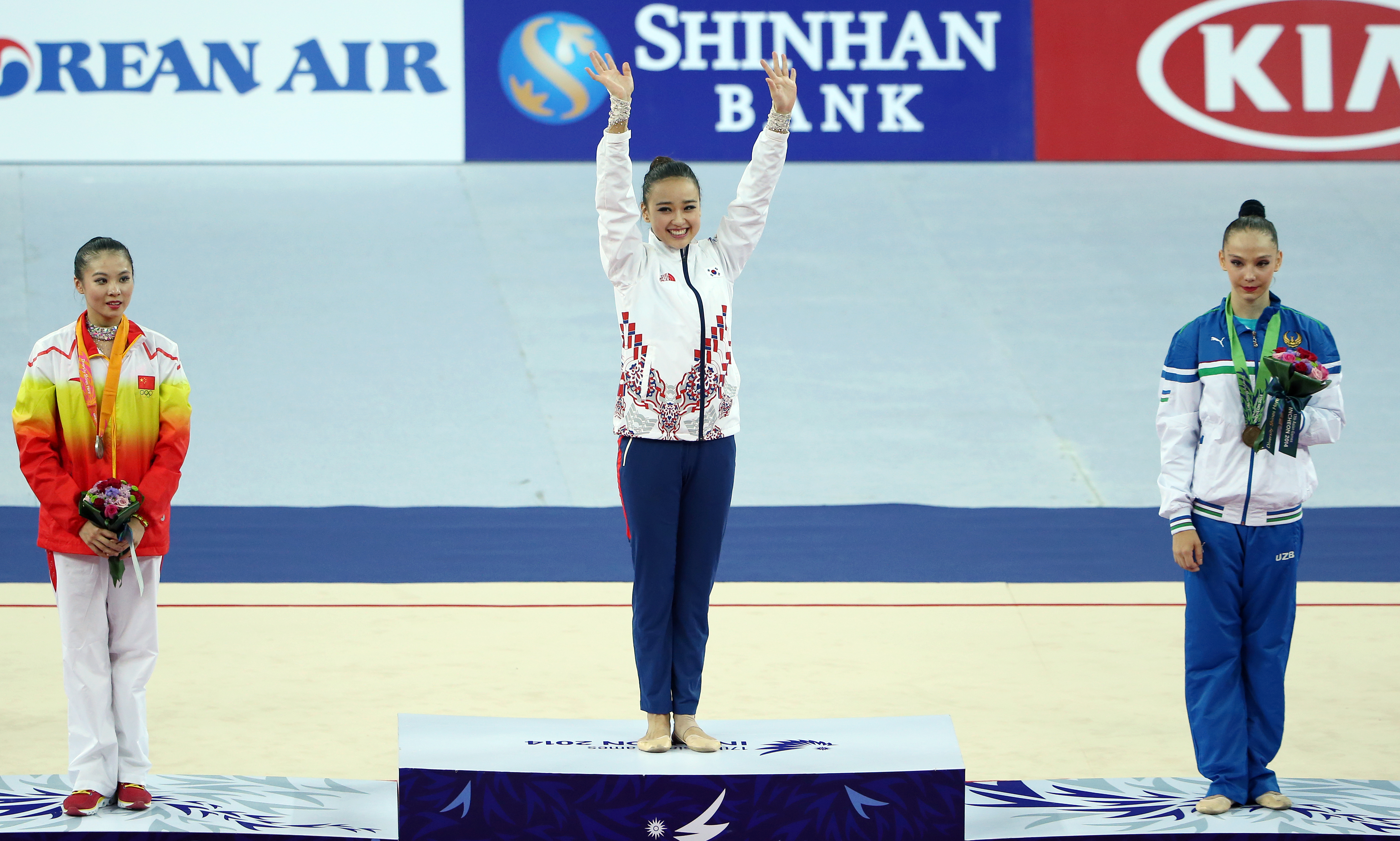 2014인천 아시아경기대회리듬체조손연재가 2일 인천시 남동체육관에서 열린 ‘2014 인천 아시아경기대회’ 리듬체조 개인전 결승에서 정상에 오른 뒤, 시상대에 올라 환호하는 관중들에게 손을 흔들어 주고 있다.2014-10-02남동체육관, 인천시문화체육관광부해외문화홍보원코리아넷전한